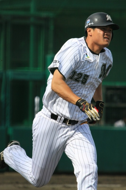 日本プロ野球 千葉ロッテマリーンズ 蔡 森夫 選手